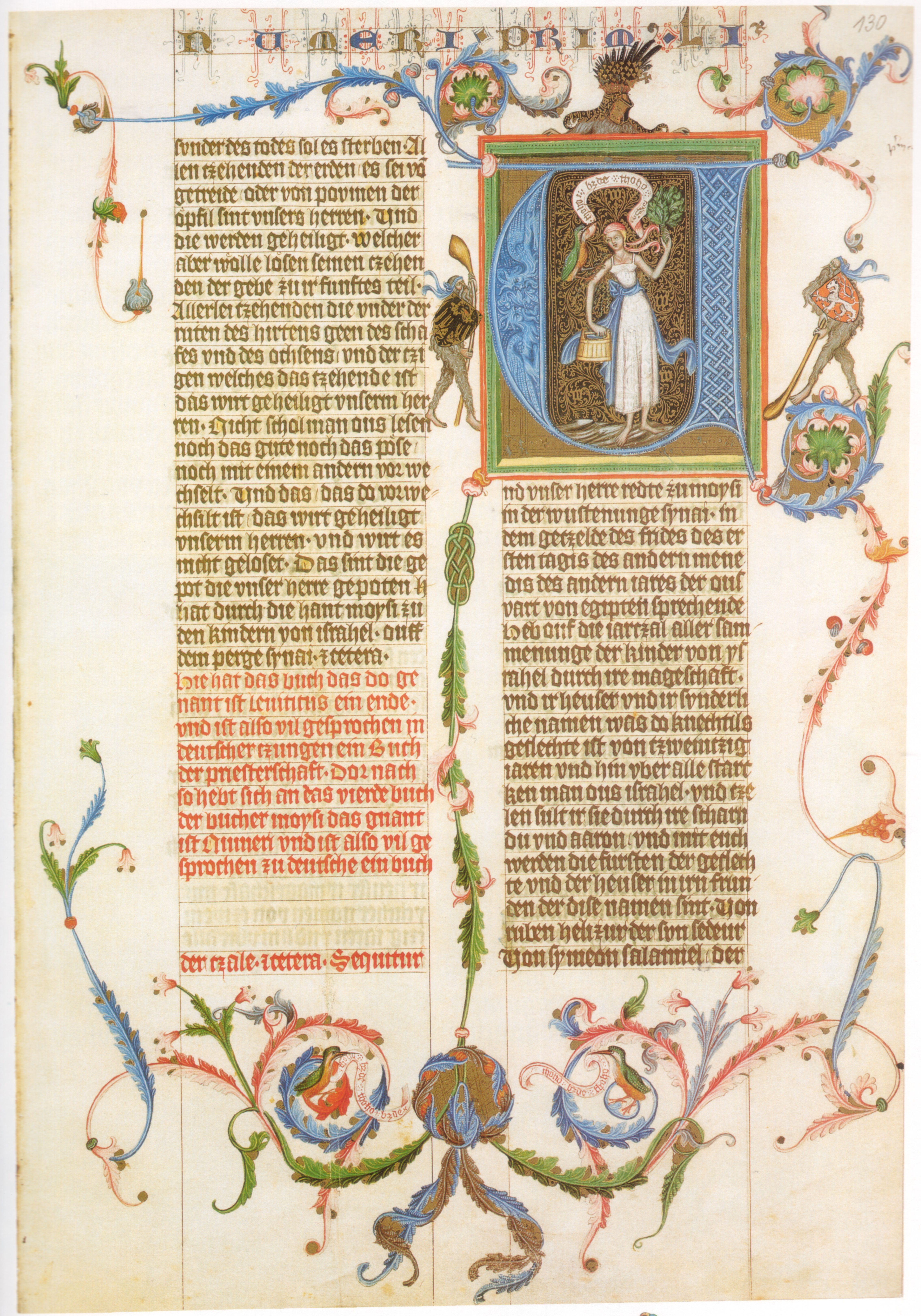 Wenzelsbibel (130r); Wien, Österreichische Nationalbibliothek, Codex Vindobonensis 2759-2764